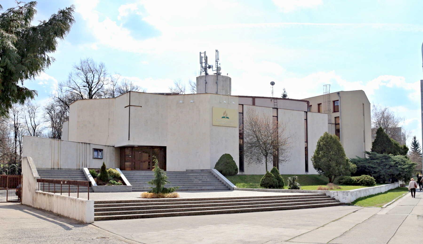 Modlitebna Církve ASD